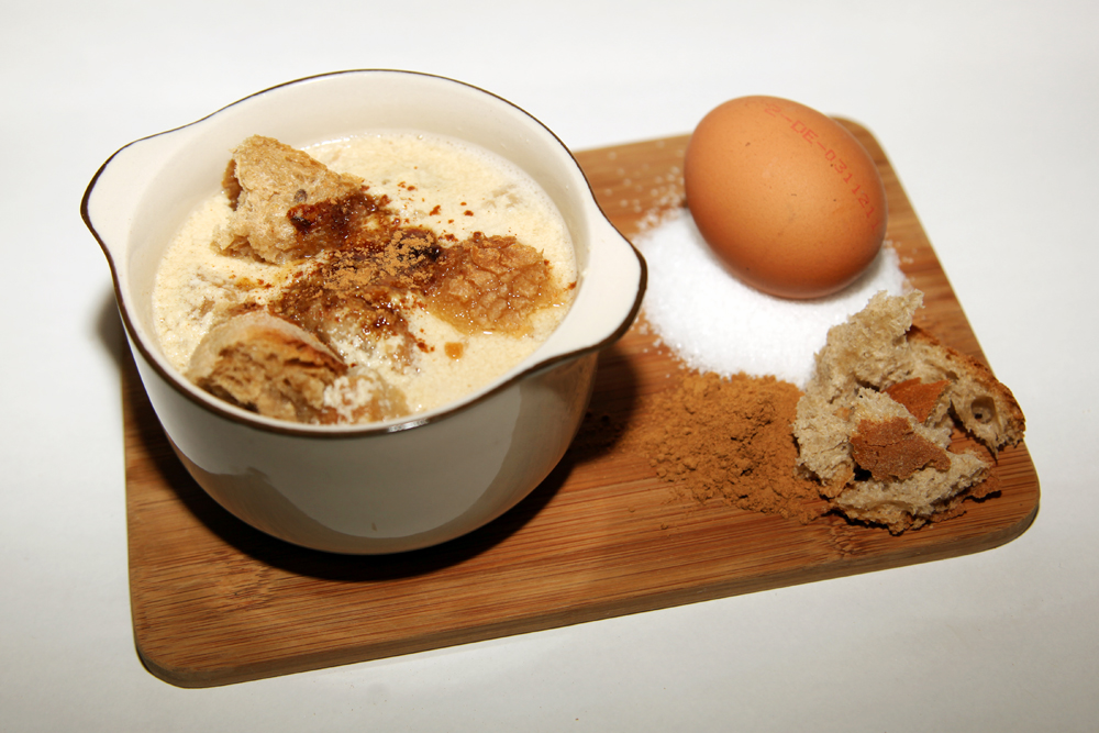 Ostersuppe aus Eiern, Mehl, Milch und Bier; gesüßt mit Zucker, Zimt und Rübensirup; angedickt mit Roggenbrötchen. Nach einem mittelalterlichen Rezept.